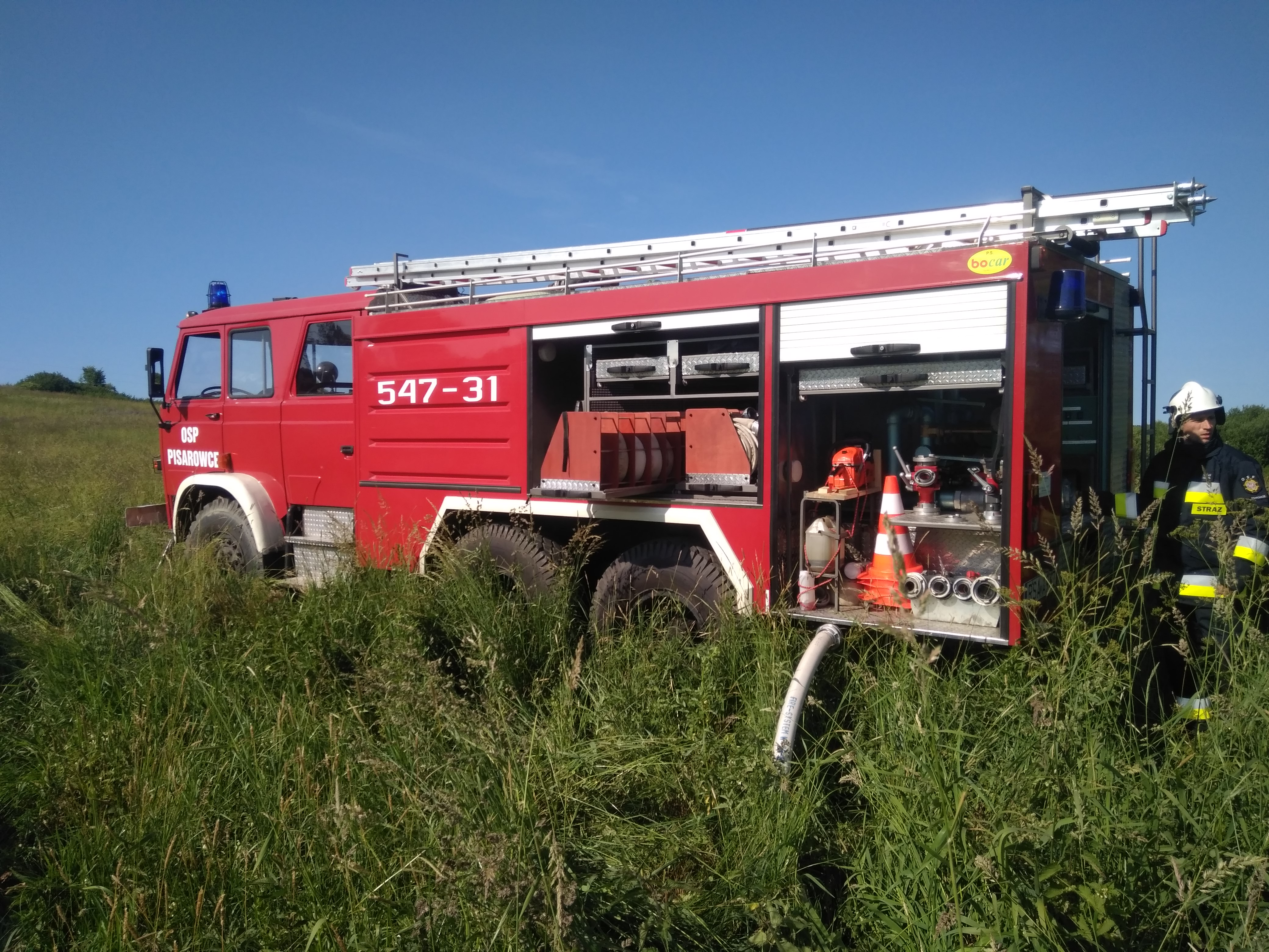 Wóz strażacki OSP Pisarowce podczas akcji gaśniczej